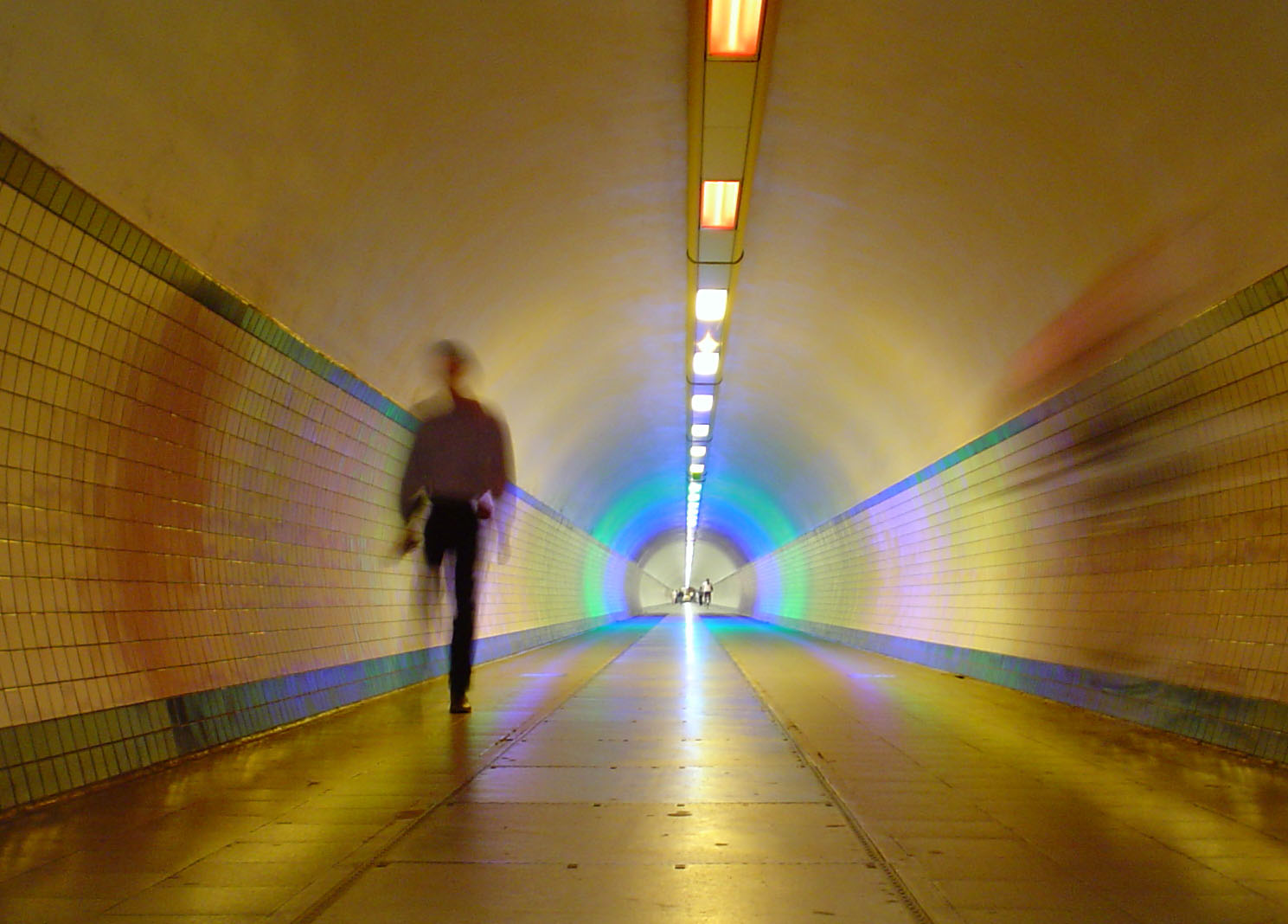 Tunnelwerken uitgevoerd van 1931 tot 1933 naar het ontwerp van Frankignoul; de architectuur van de bovenbouwen werd verzorgd door E. Van Averbeke. Het Kleine Tunnelgebouw kwam op de plaats van de Waterpoort of Koninklijke poort, afkomstig van de Vlasmarkt, die uiteengenomen en in 1936 terug geplaatst werd op de Gillisplaats. Bron: Goossens M.& Plomteux G. met medewerking van Linters A., Steyaert R., Illegems P. & De Barsée L. 1976: Inventaris van het cultuurbezit in België, Architectuur, Stad Antwerpen, Bouwen door de eeuwen heen 3NA, Brussel - Gent.Auteurs: Goossens , Miek & Plomteux, Greet